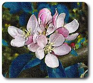 Voorbeeld van artistieke bewerking; verkleinde en bewerkte foto.